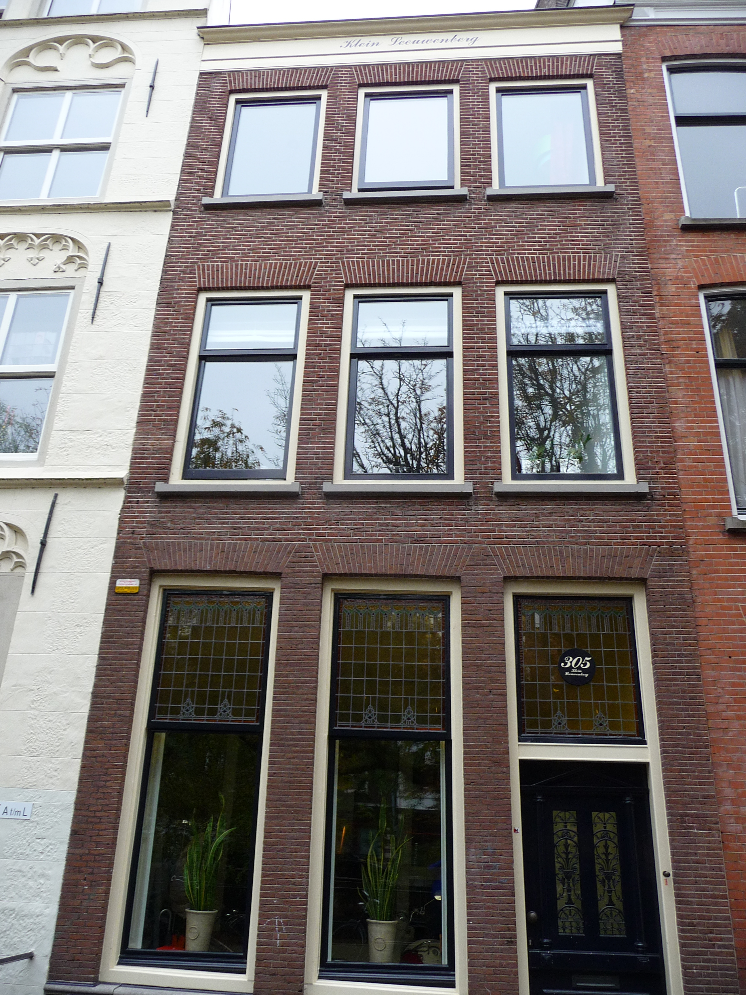 Rijksmonument aan de Oudegracht in Utrecht (stad)